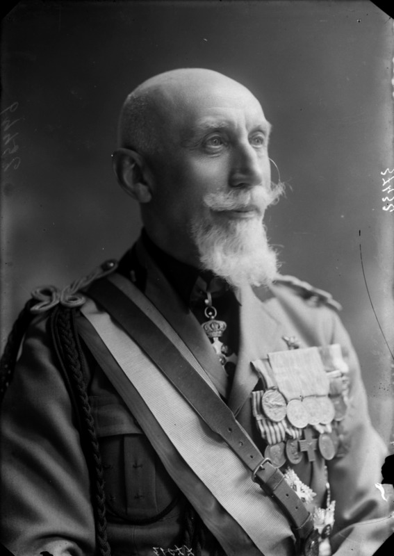 Emilio De Bono fotografato da Mario Nunes Vais